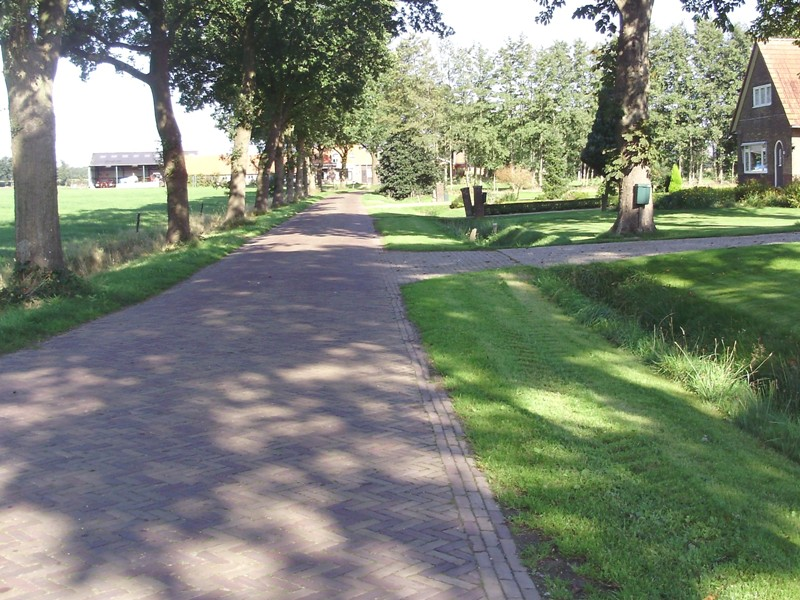 Buurtschap Rijsberkampen in Weststellingwerf (Friesland)